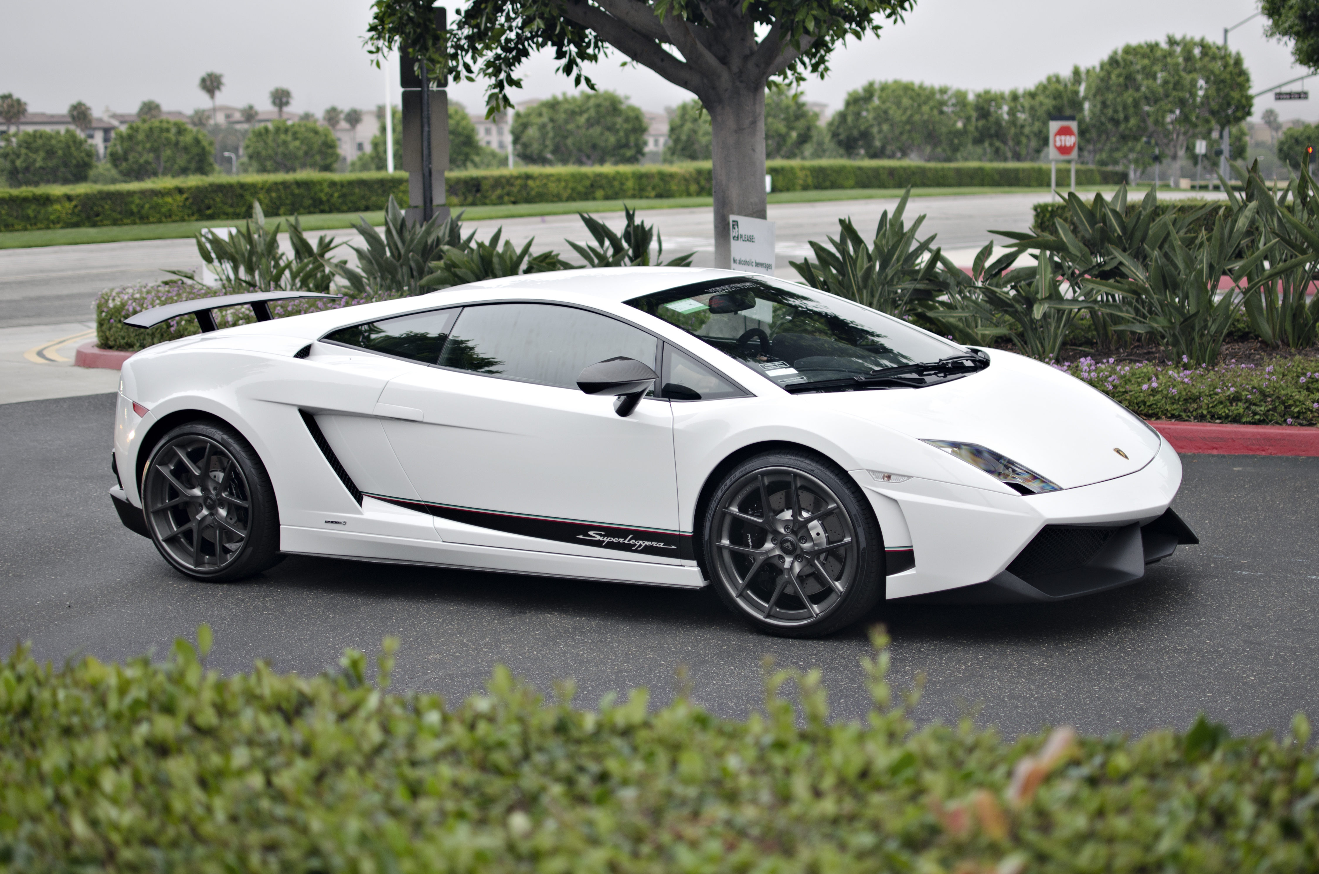 White Lamborghini LP560-4 Superleggera